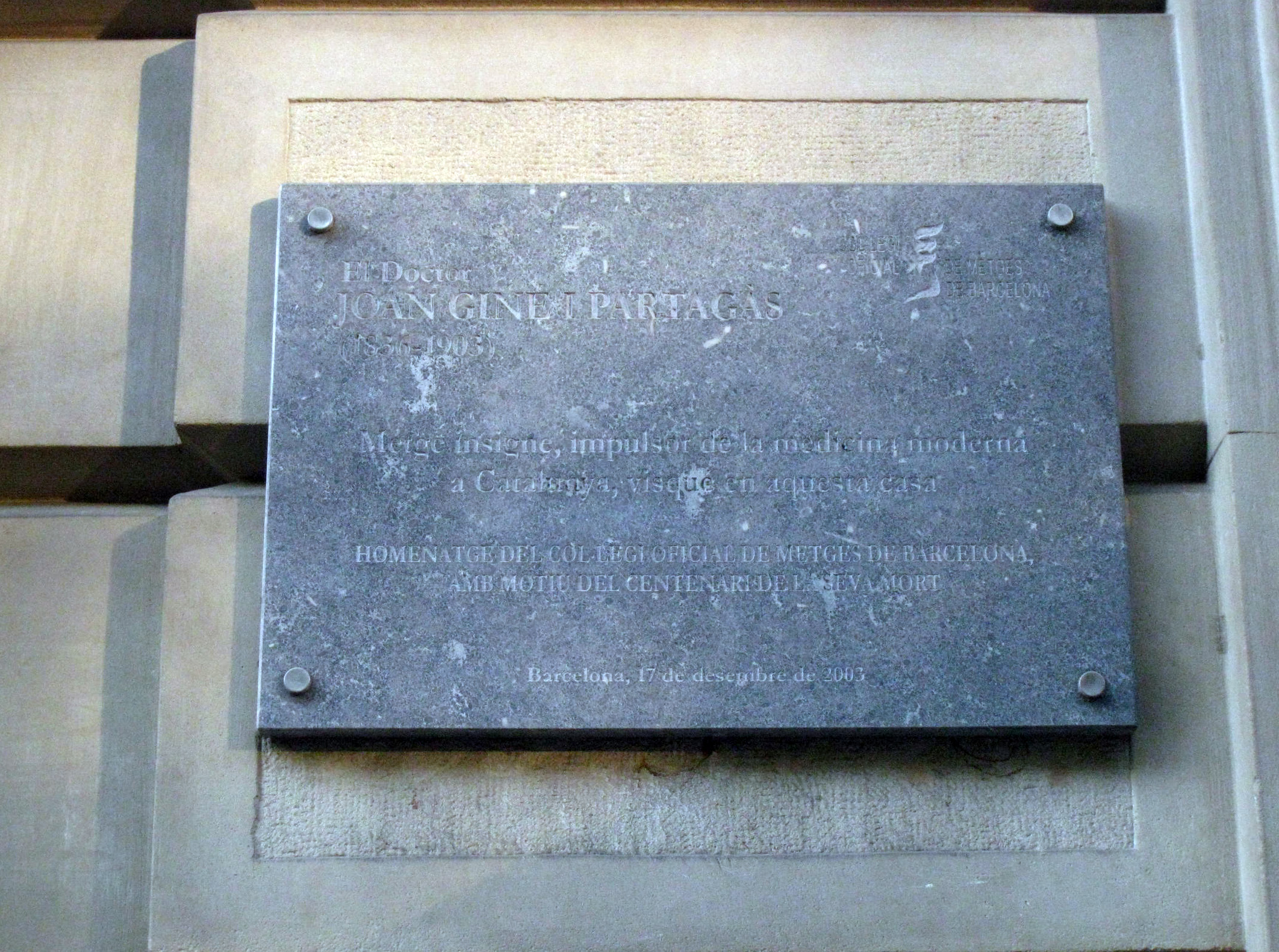 Joan Giné i Partagás. Rambla Catalunya, 116 (Barcelona)